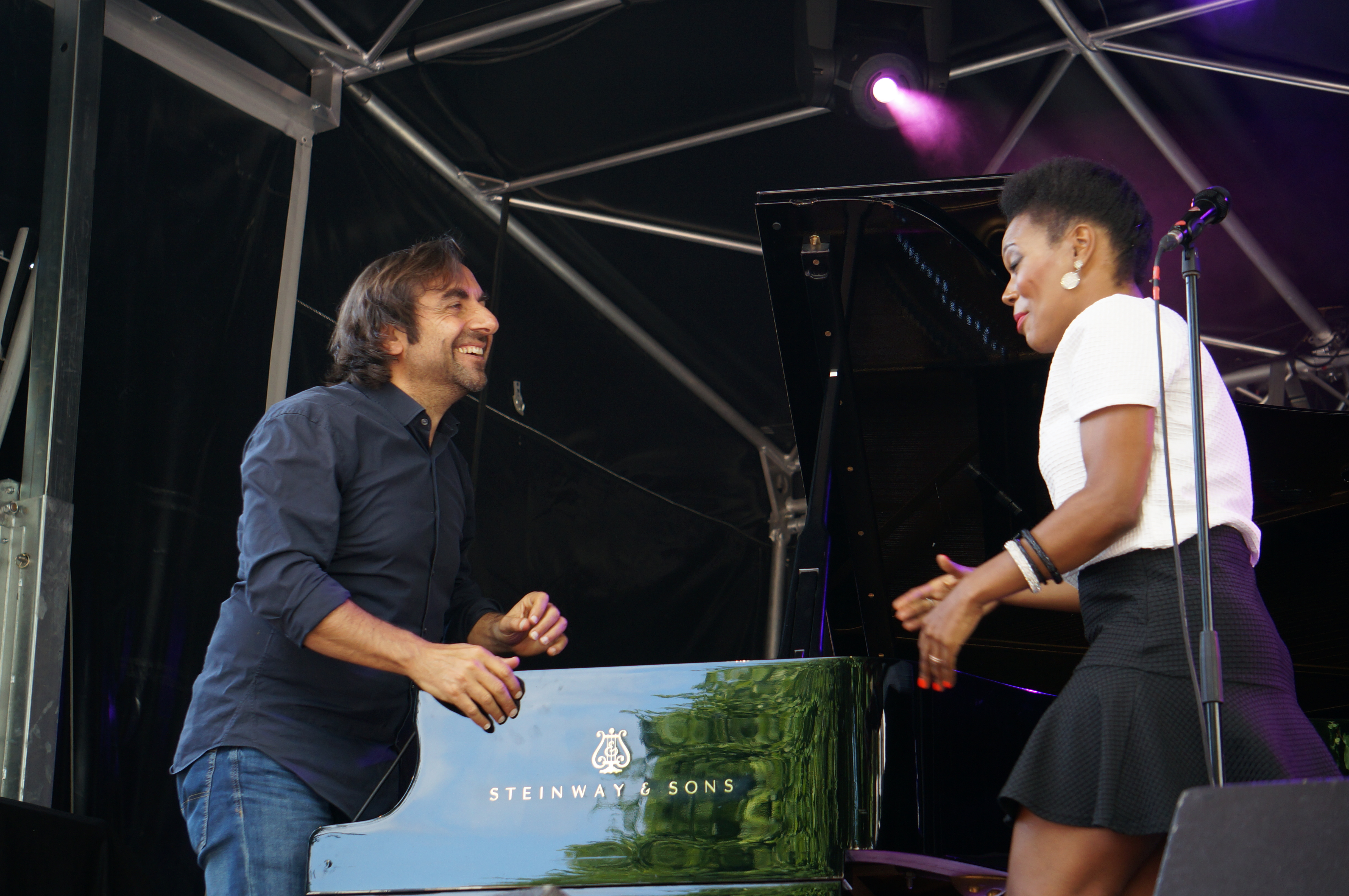 COncert lors de Art & Jazz 2014.